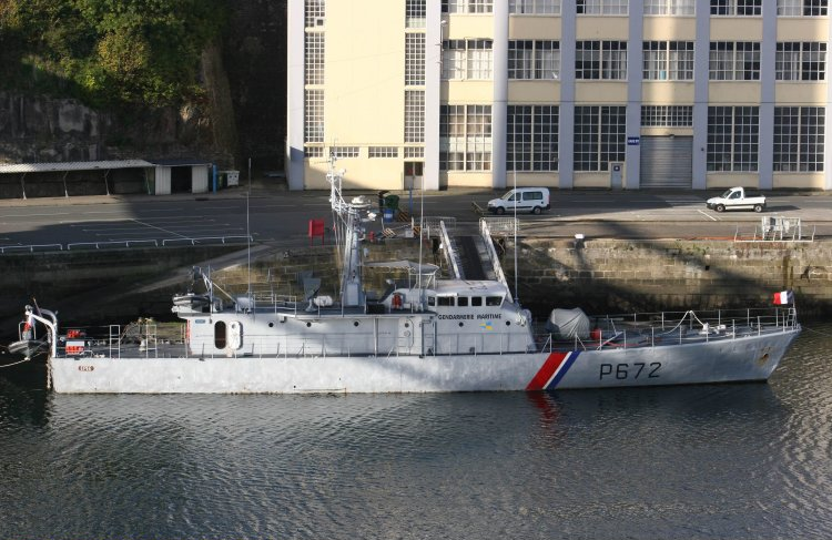 Le patrouilleur rapide Epée (P672) amarré à Brest, dans la Penfeld (1er novembre 2006) Original caption: " Photo © Yannick Le Bris"